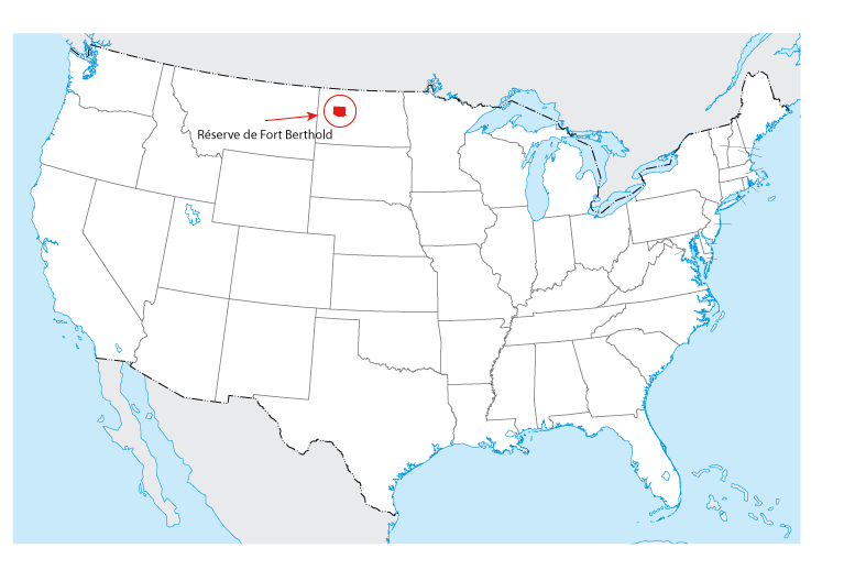 Carte de la Réserve de Fort Berthold (Dakota du Nord)